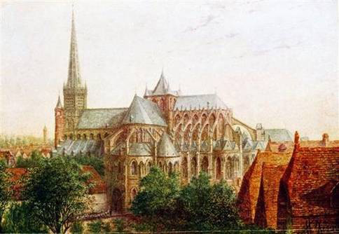 Cathédrale de Cambrai détruite à la révolution française (gravure antérieure à 1789)